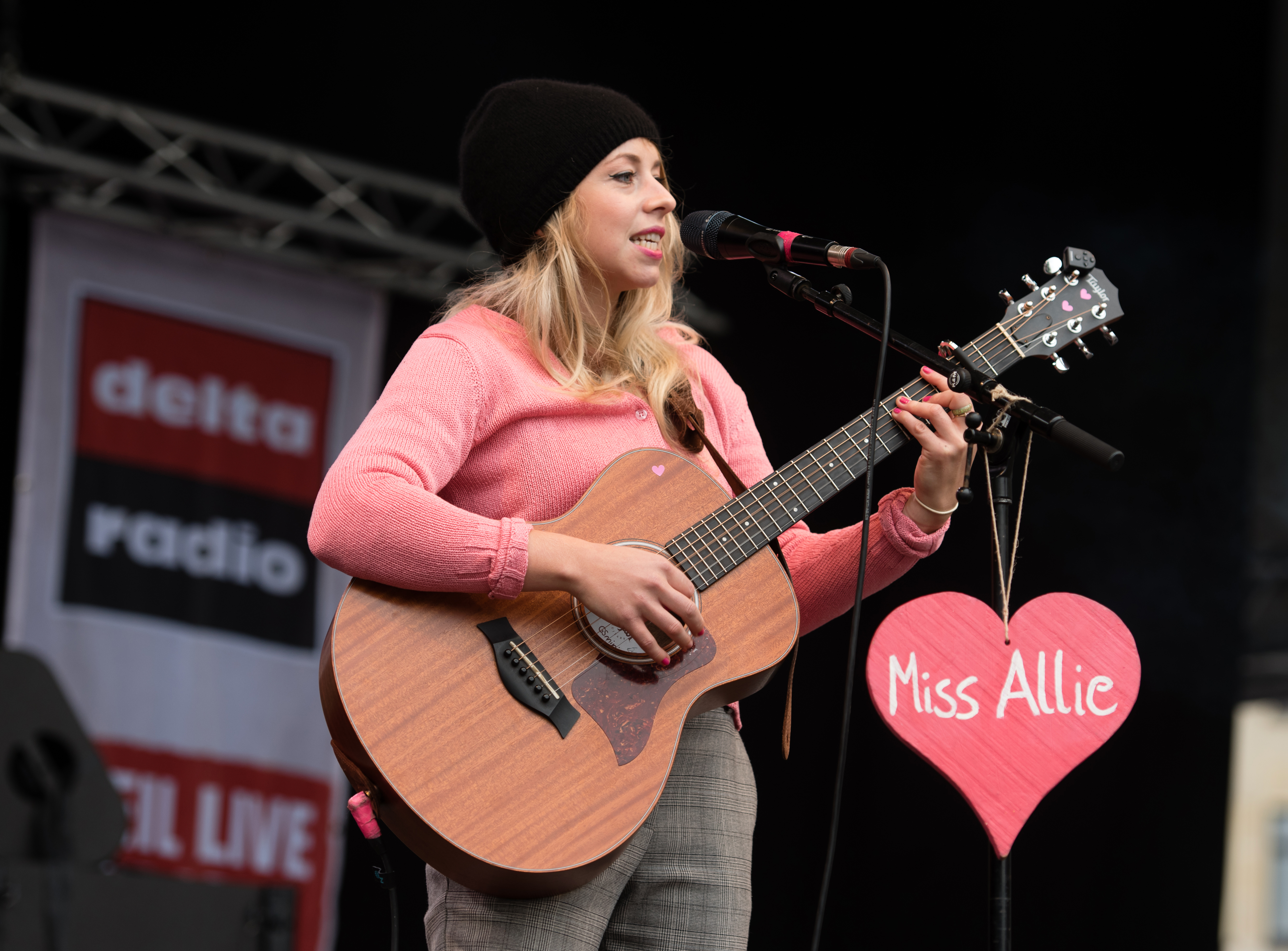 Miss Allie beim Rockspektakel in Hamburg 2018